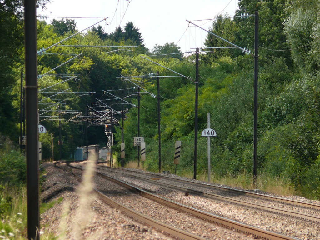 Lieu de l'accident de Zoufftgen